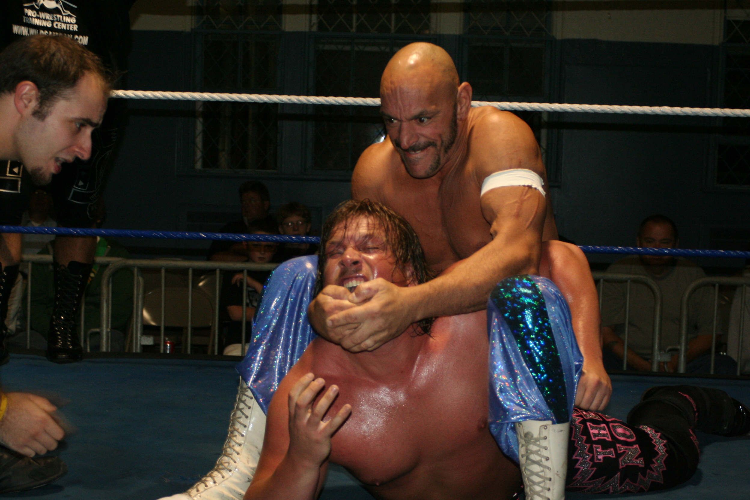 sabu haciendo la camel clutch